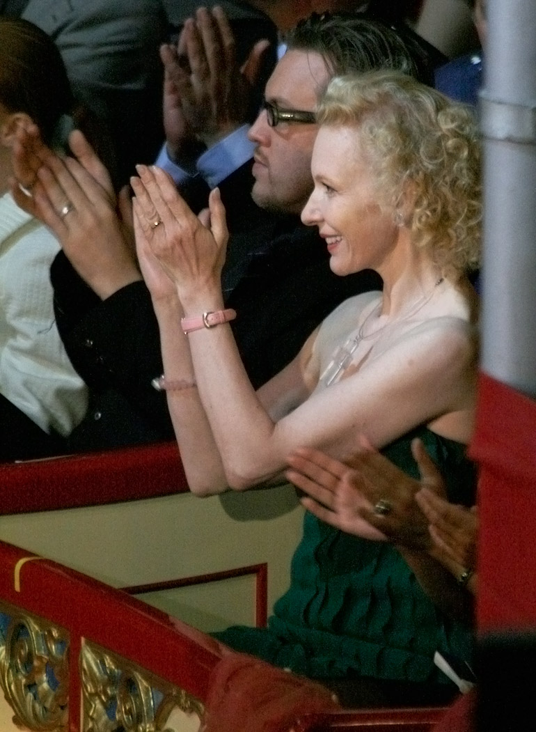 Verleihung des Nestroy-Theaterpreises 2009: Sunnyi Melles und Nicholas Ofczarek (Circus Roncalli auf dem Wiener Rathausplatz).